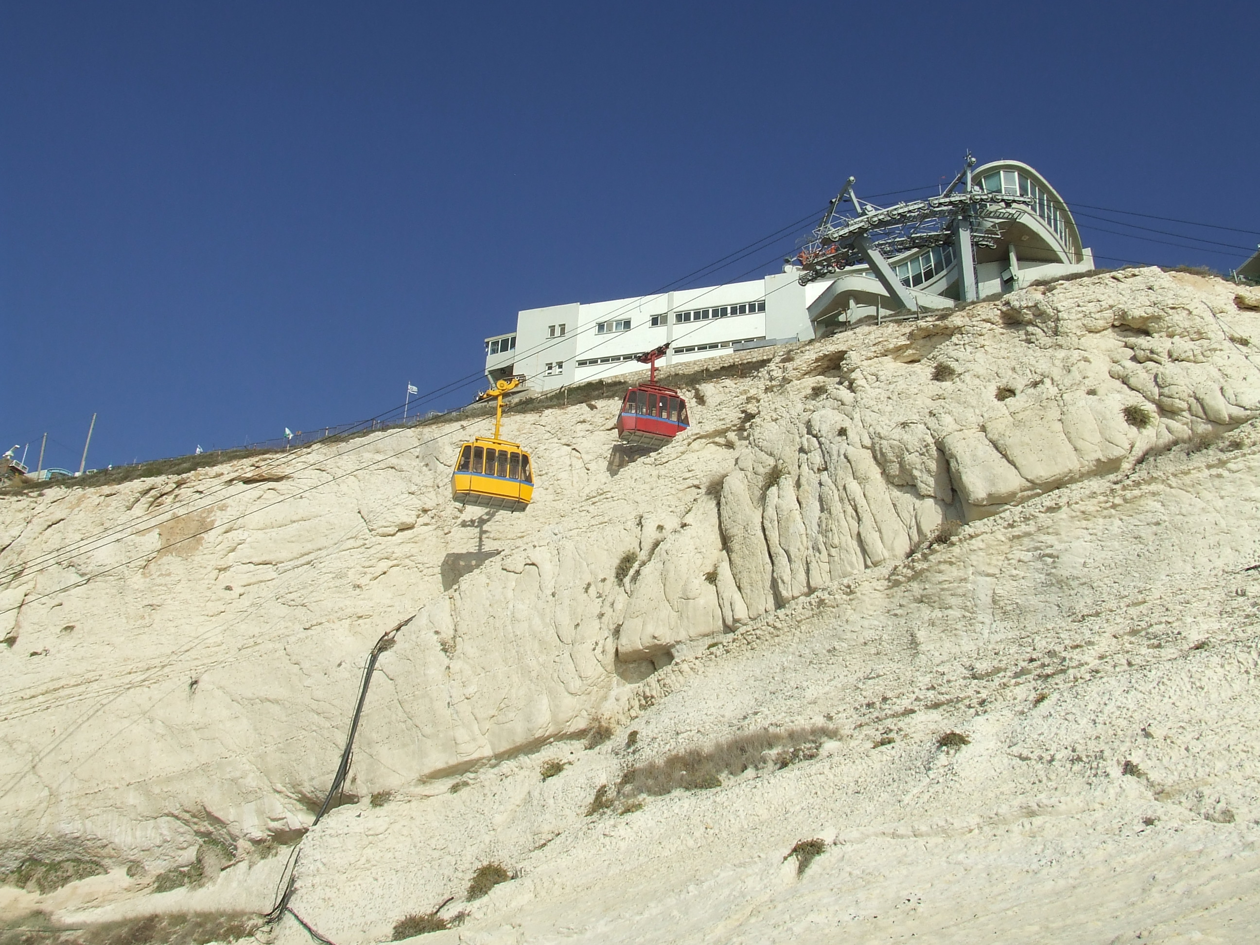 Rosh HaNikra, Israel